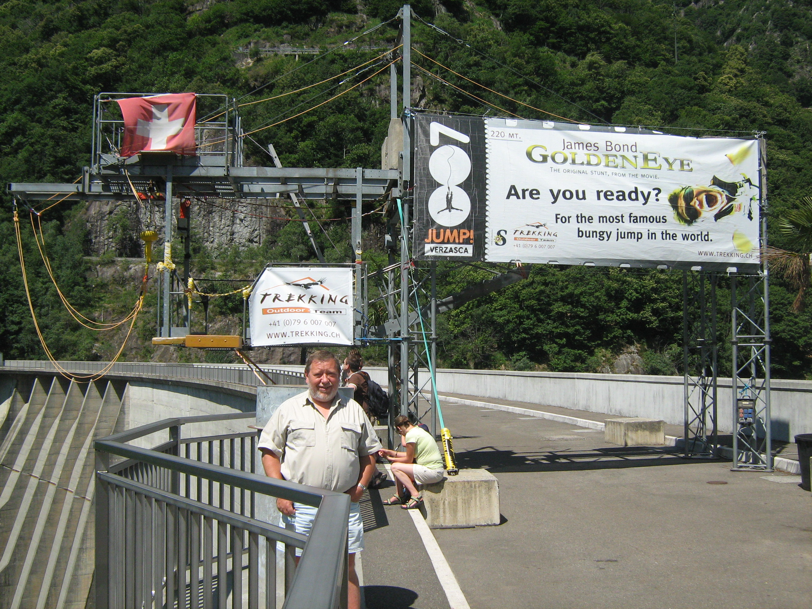 Bungy-Jumpudsprigningene på Verzasca-dæmningen sker herfra